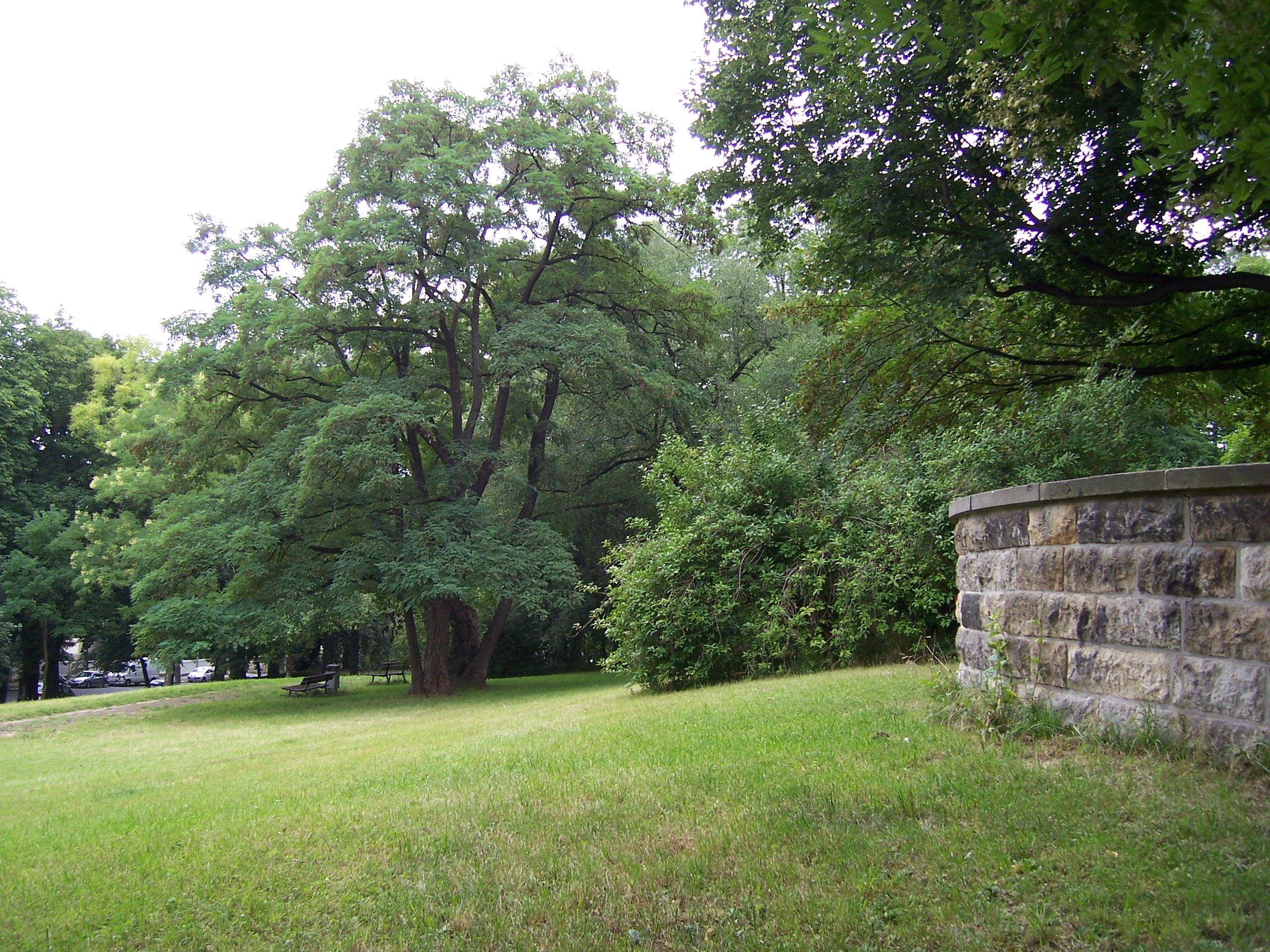 Beutlerpark in Dresden, Blick in nördlicher Richtung über den westlichen Teil des denkmalgeschützten Parks